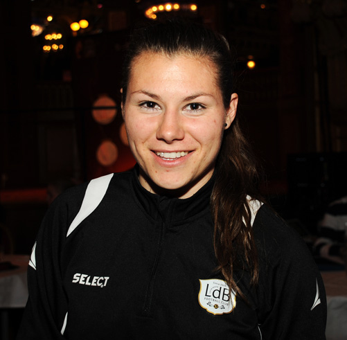 Ramona Bachman